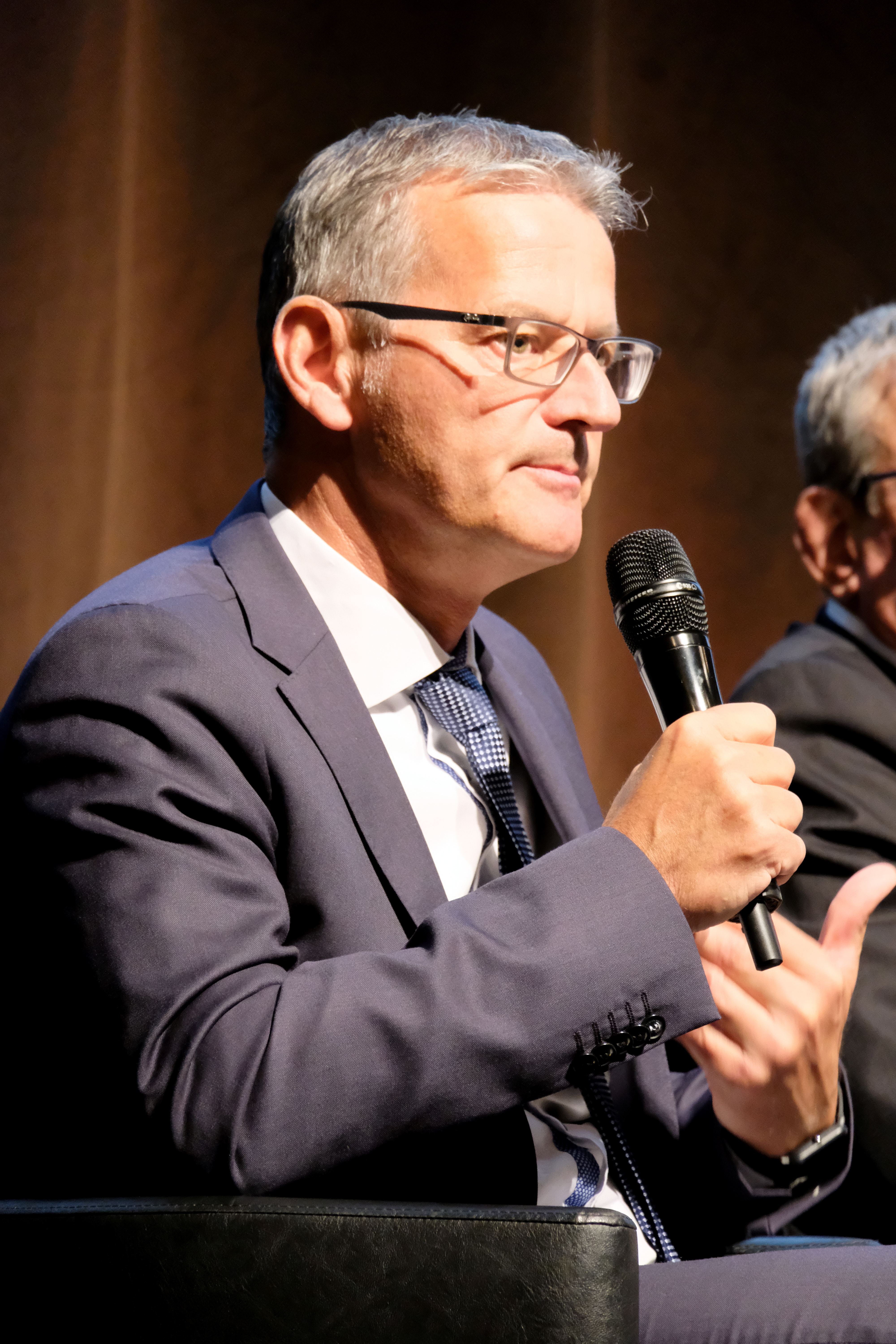 Dr. Gerald Gaß im Mai 2019 auf dem Hauptstadtkongress in Berlin